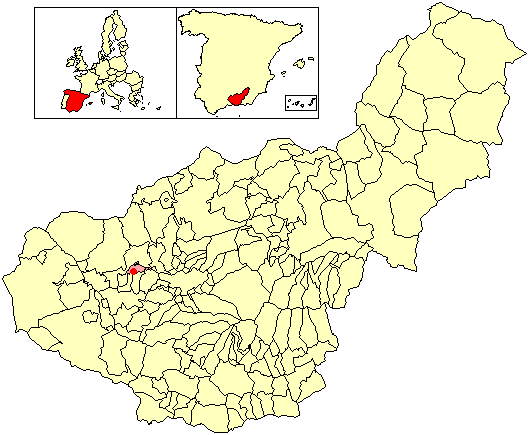 Situación de la localidad de La Paz (en el municipio de Fuente Vaqueros) respecto a la provincia de Granada, en España.